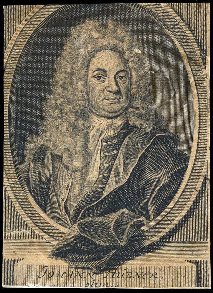 1 grafiskt blad, kopparstick föreställande Johann Hübner (1688-1731), historiker.